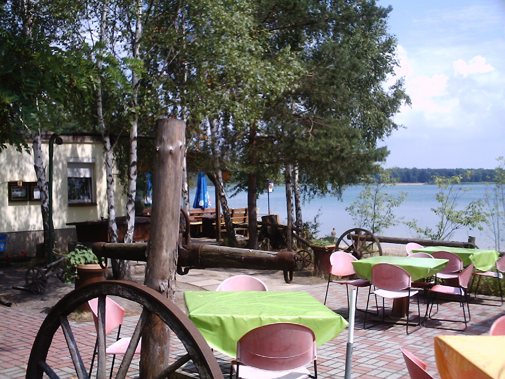 Gaststätte am Grünewalder Lauch